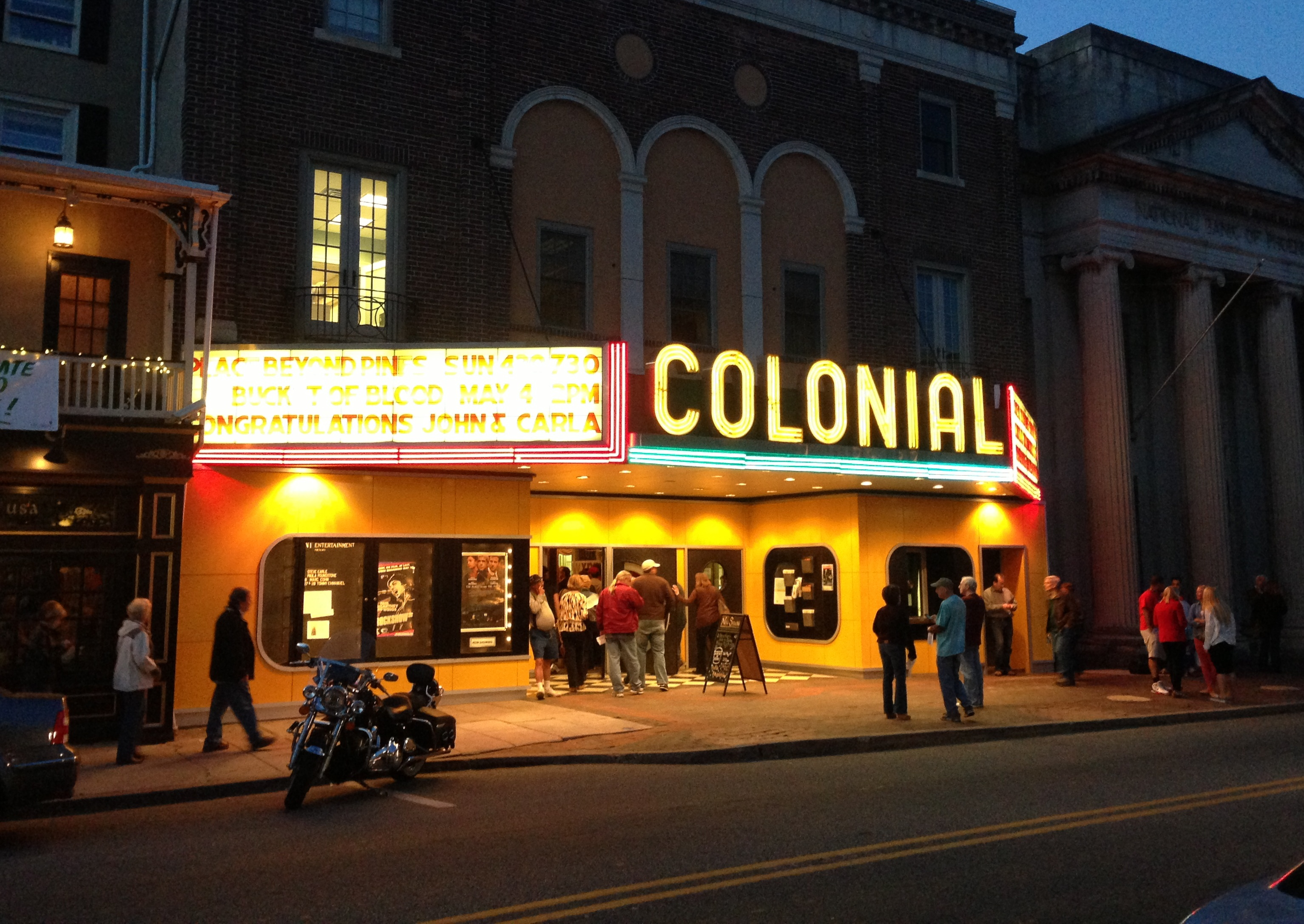 Колониальный кинотеатр (Финиксвилл) Май 2013 года